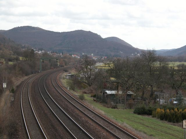 Dreigleisabschnitt bei Hersbruck rechts Pegnitz